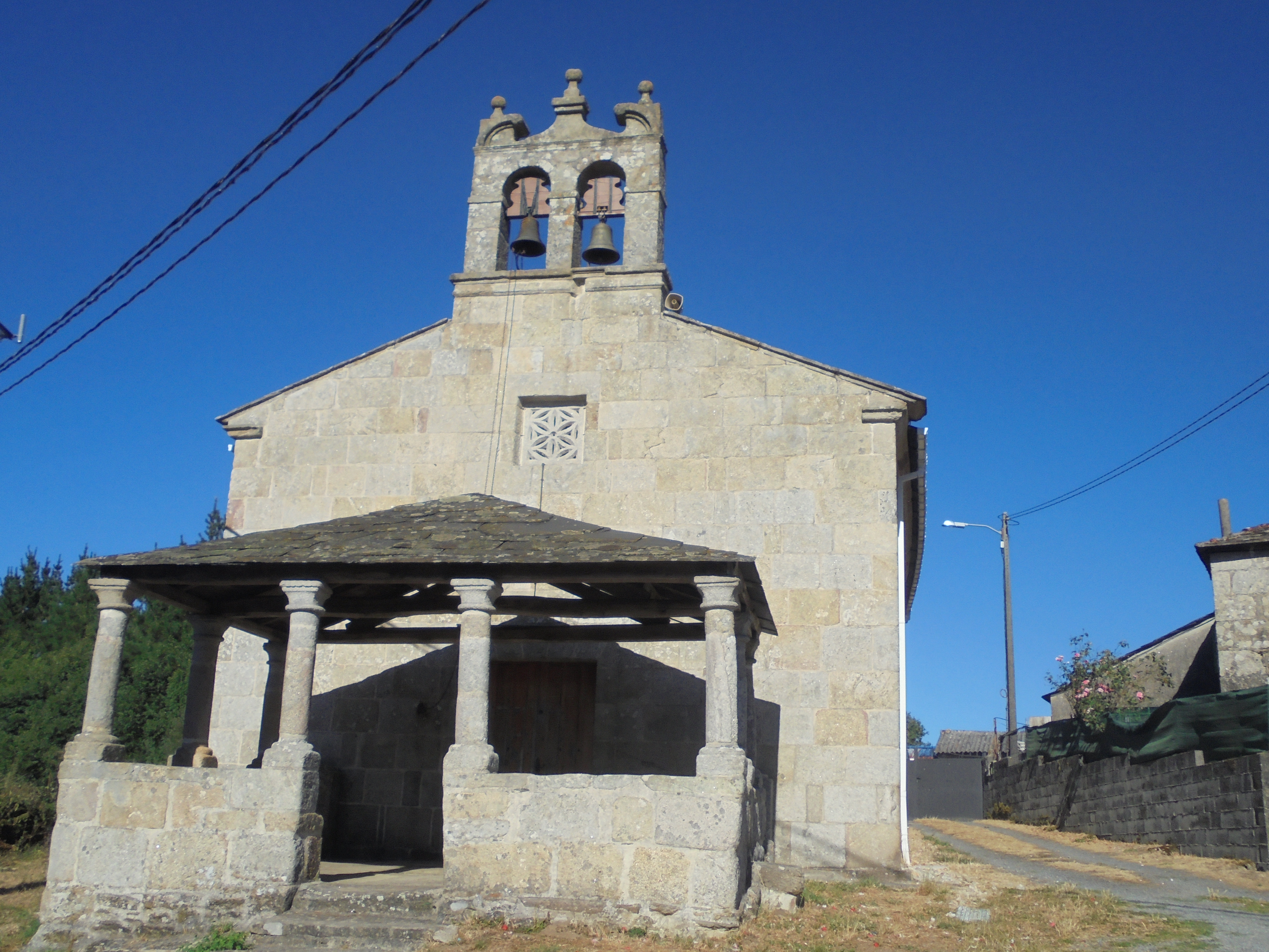 Igrexa parroquial de San Xoán do Alto ( Lugo)